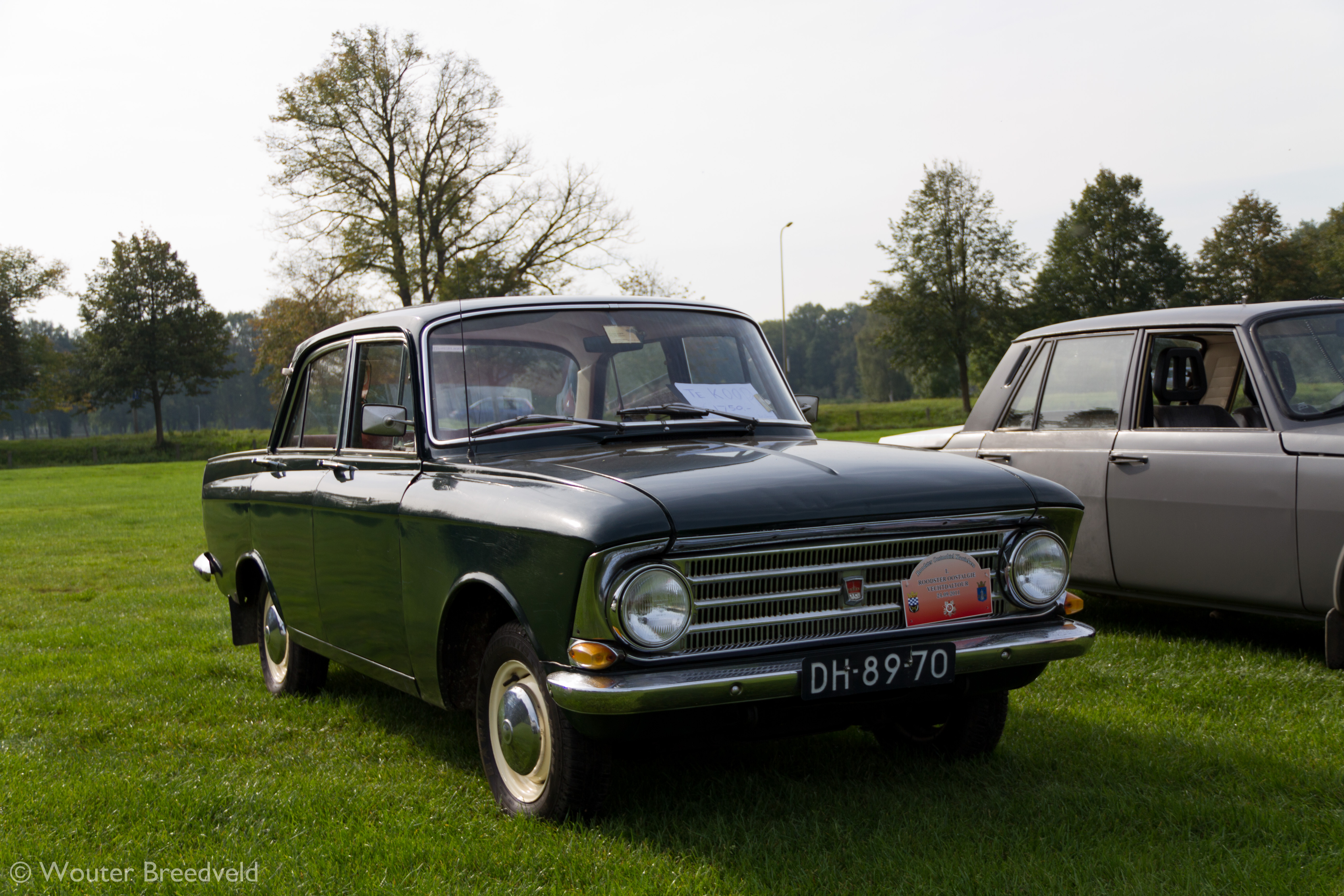 Moskvitch 412